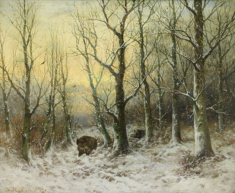 "Wildschweine in Winterlandschaft", Öl auf Leinwand, 76 x 95 cm, unten links handsigniert "Jos. Heydendahl Df."